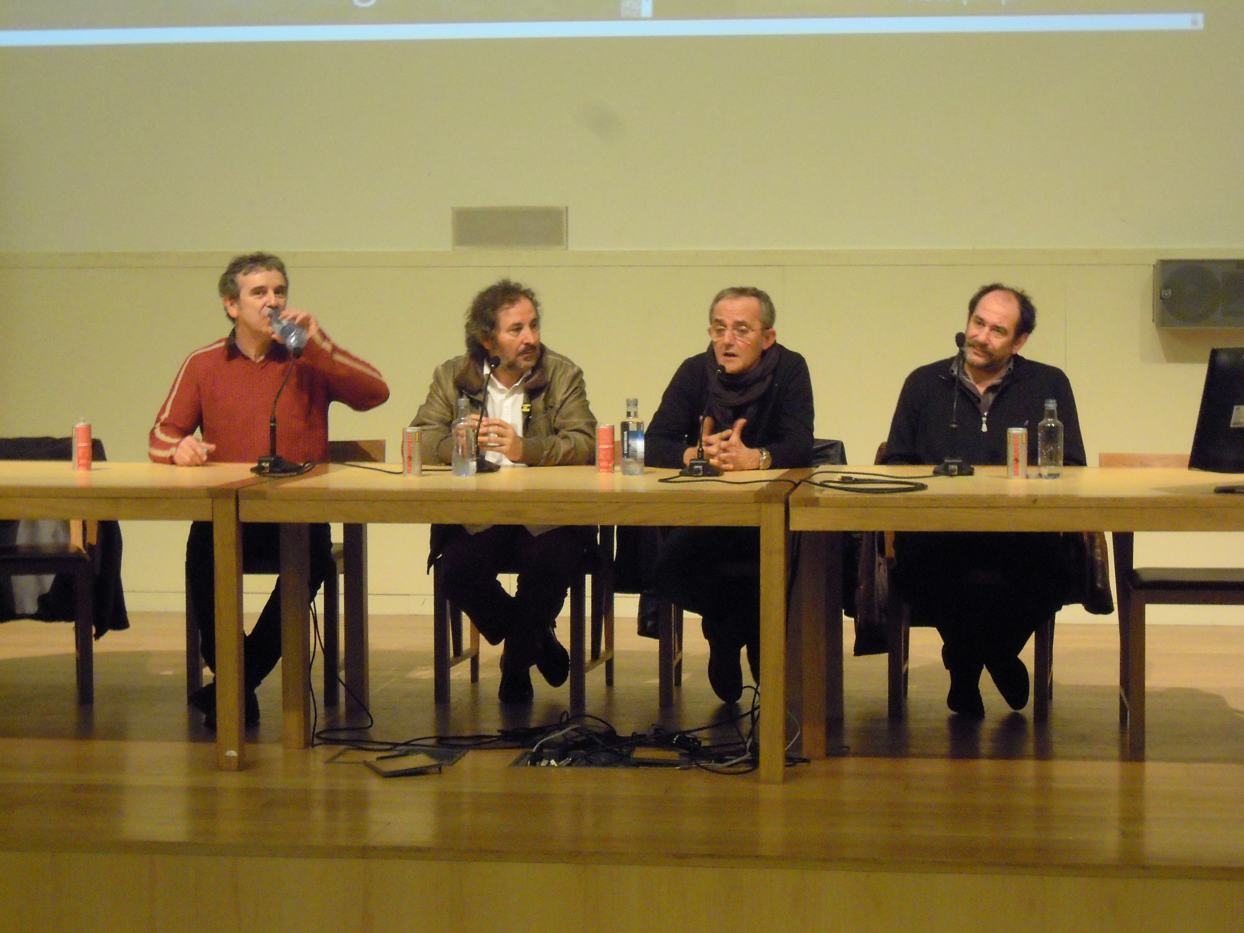 Miguel de Lira, Ignacio Vilar, Antonio Durán "Morris" e Karra Elejalde na presentación do filme A esmorga, na Facultade de Xornalismo de Santiago de Compostela